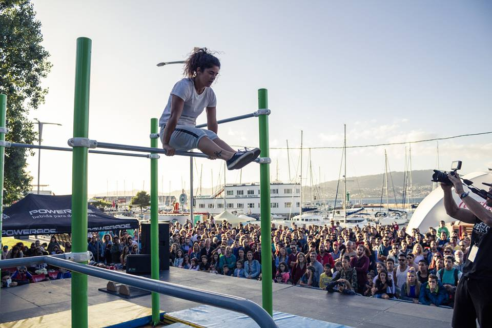 Campeona de España de Street Workout y Calistenia 2017